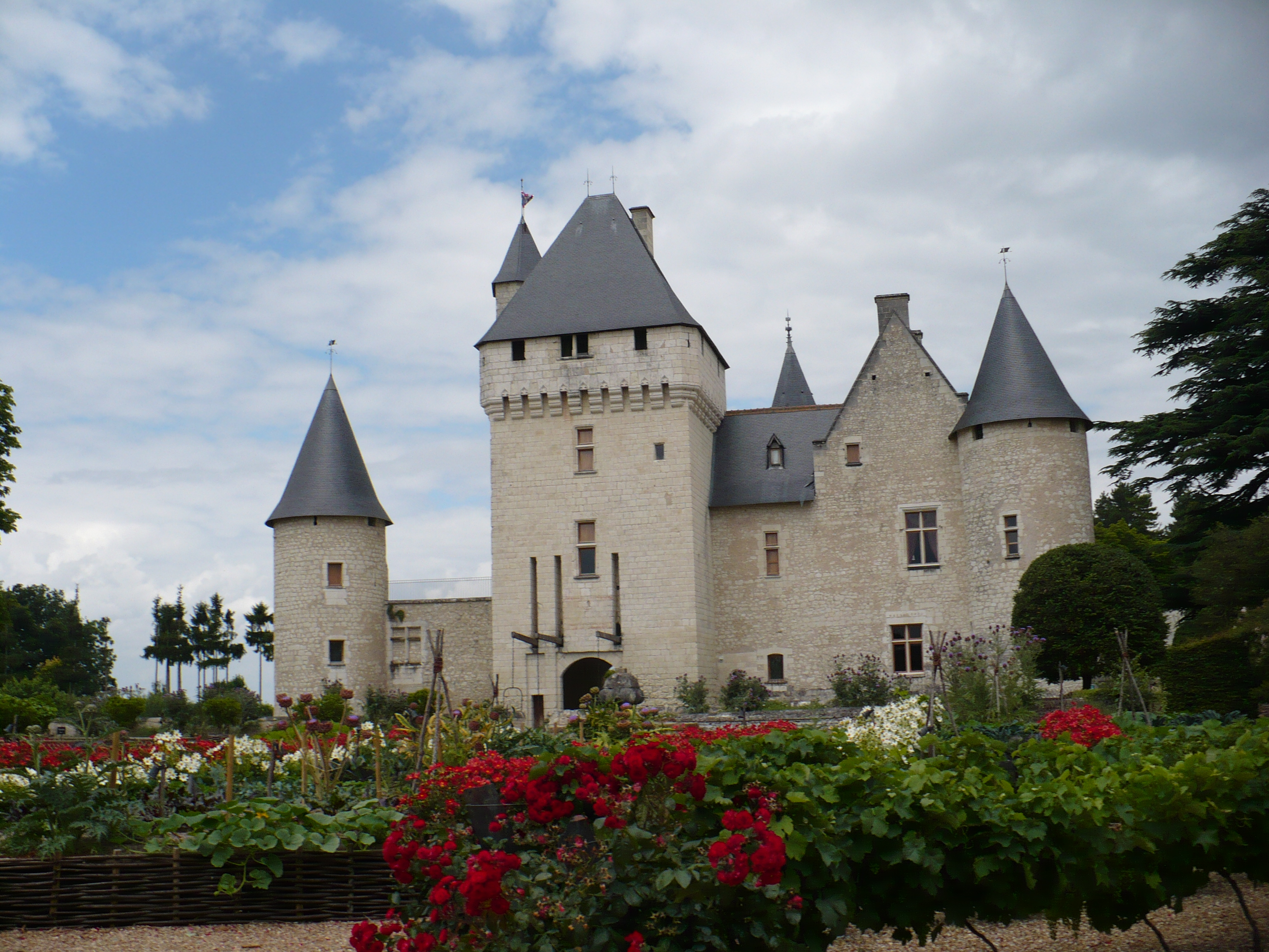 photo du chateau du riveau et de ses jardins This building is en partie classé, en partie inscrit au titre des Monuments Historiques. .